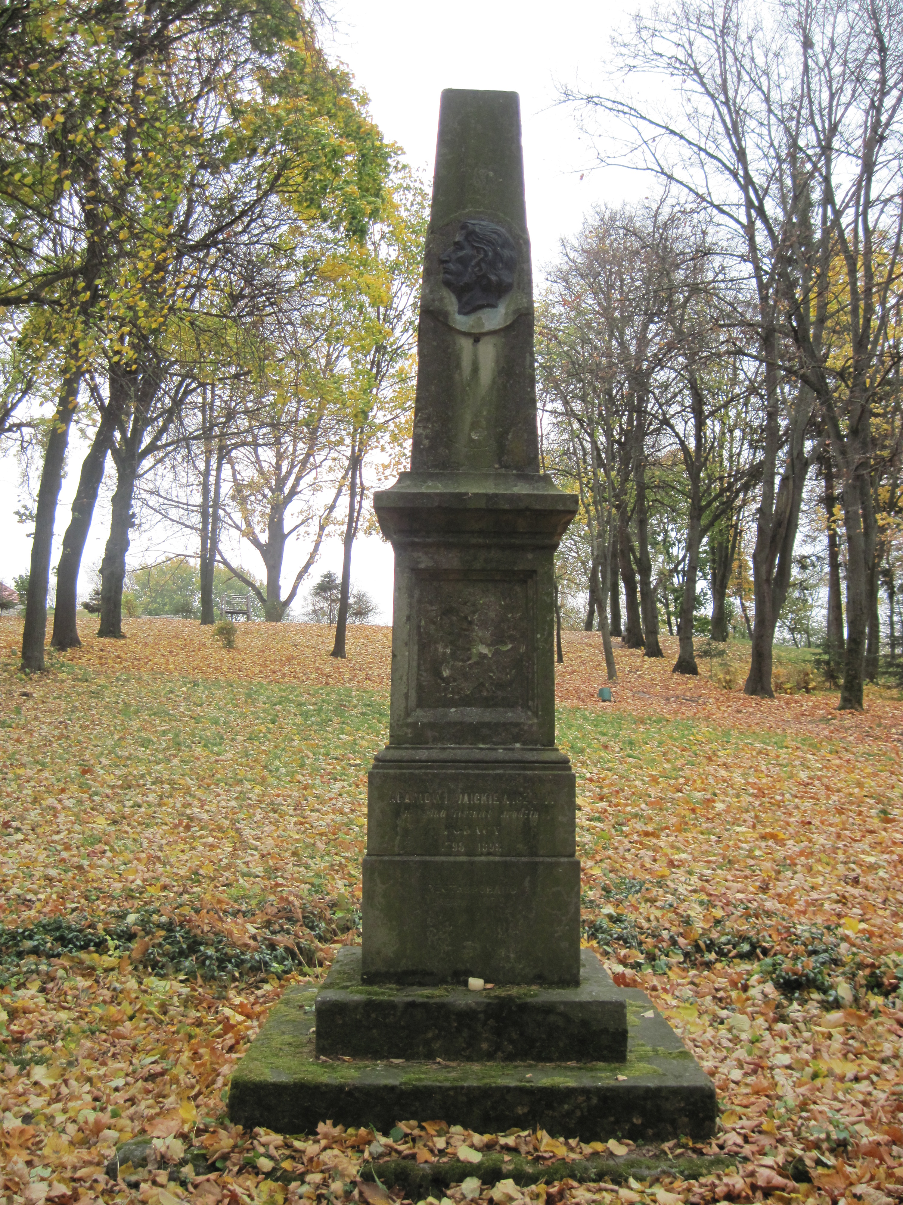 Пам'ятник А. Міцкевичу до відновлення, Збаразький парк коло замку, осінь 2014